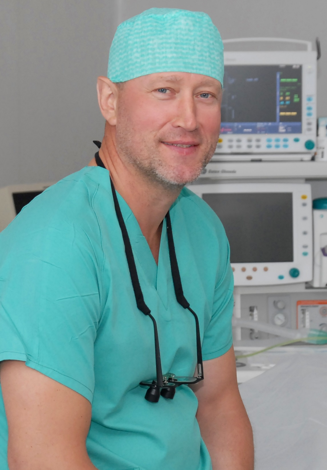 Rytis Rimdeika operacinėje